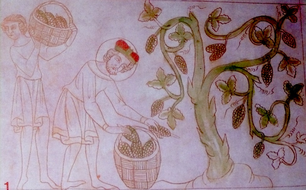 Sv. Václav na vinici